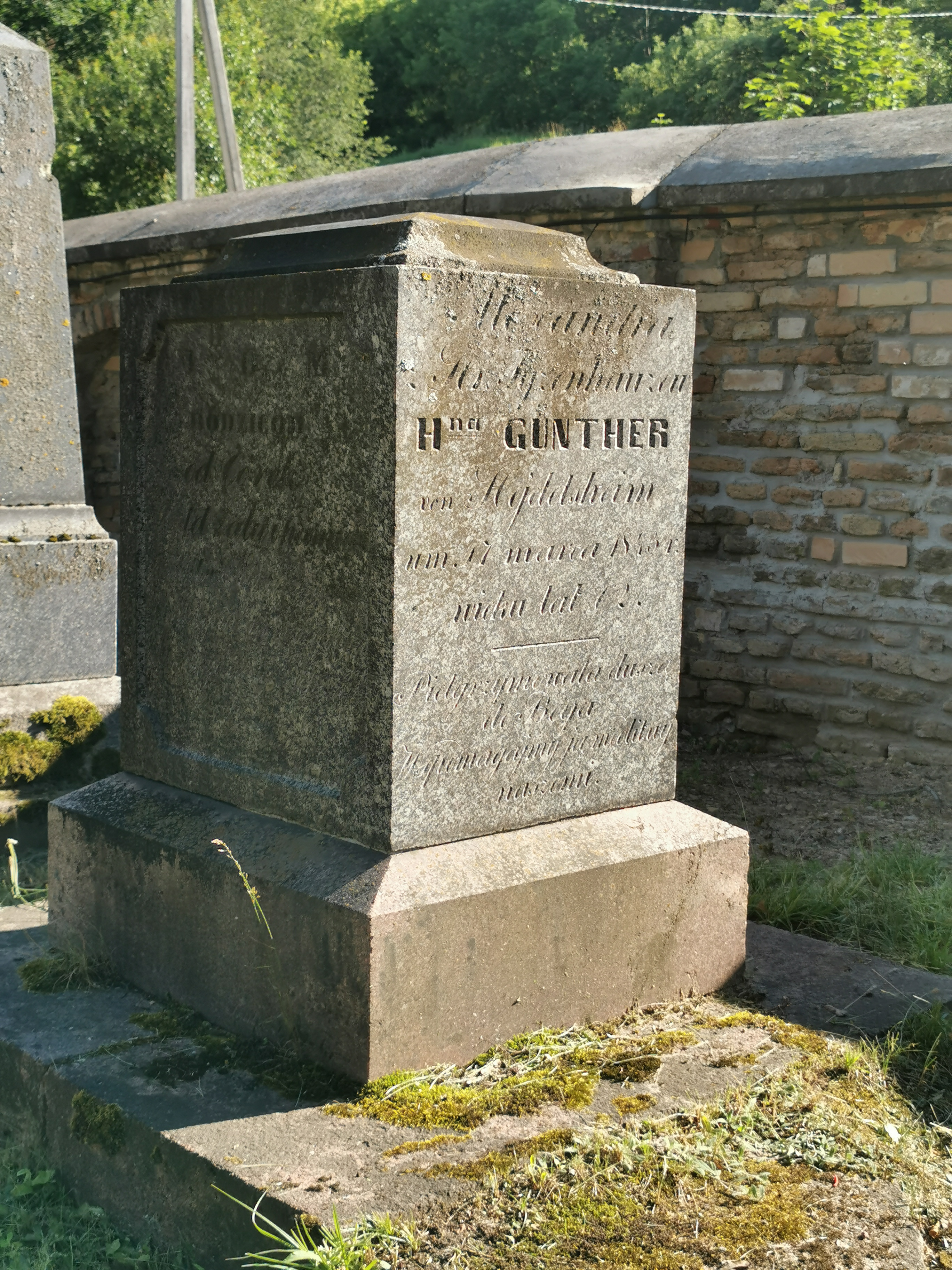 Adomo Giunterio antkapis Rasų kapinėse, 15 a sektorius. Adomas Giunteris (vok. Adam Abraham Ignacy Giunter von Hildelsheim, 1782 m. – 1854 m.) – kunigaikštis, meno kolekcionierius, dailės mecenatas, Vilniaus Labdarybės draugijos prezidentas.